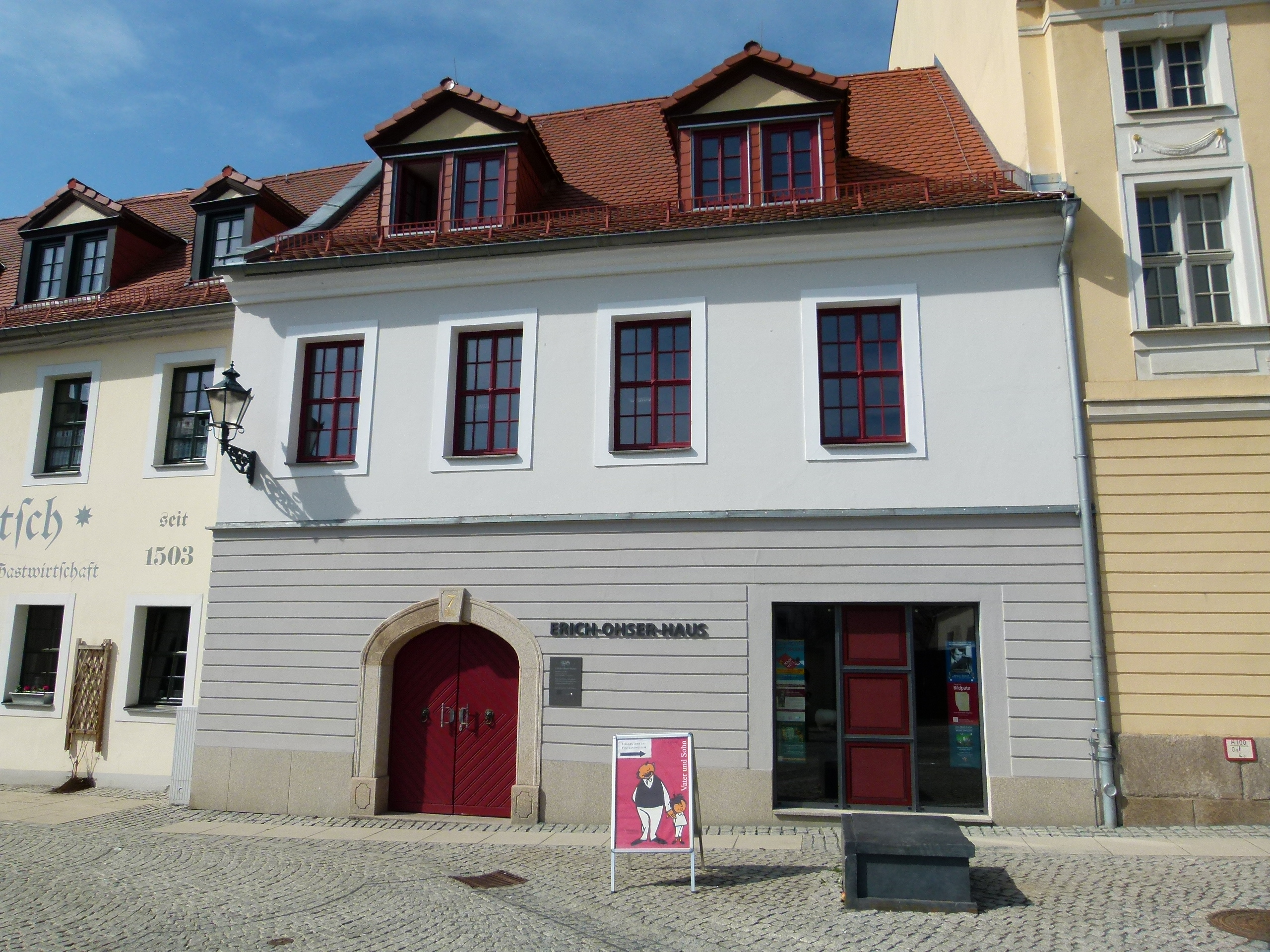 Denkmalgeschütztes Gebäude Nobelstraße 7, Plauen, Sachsen